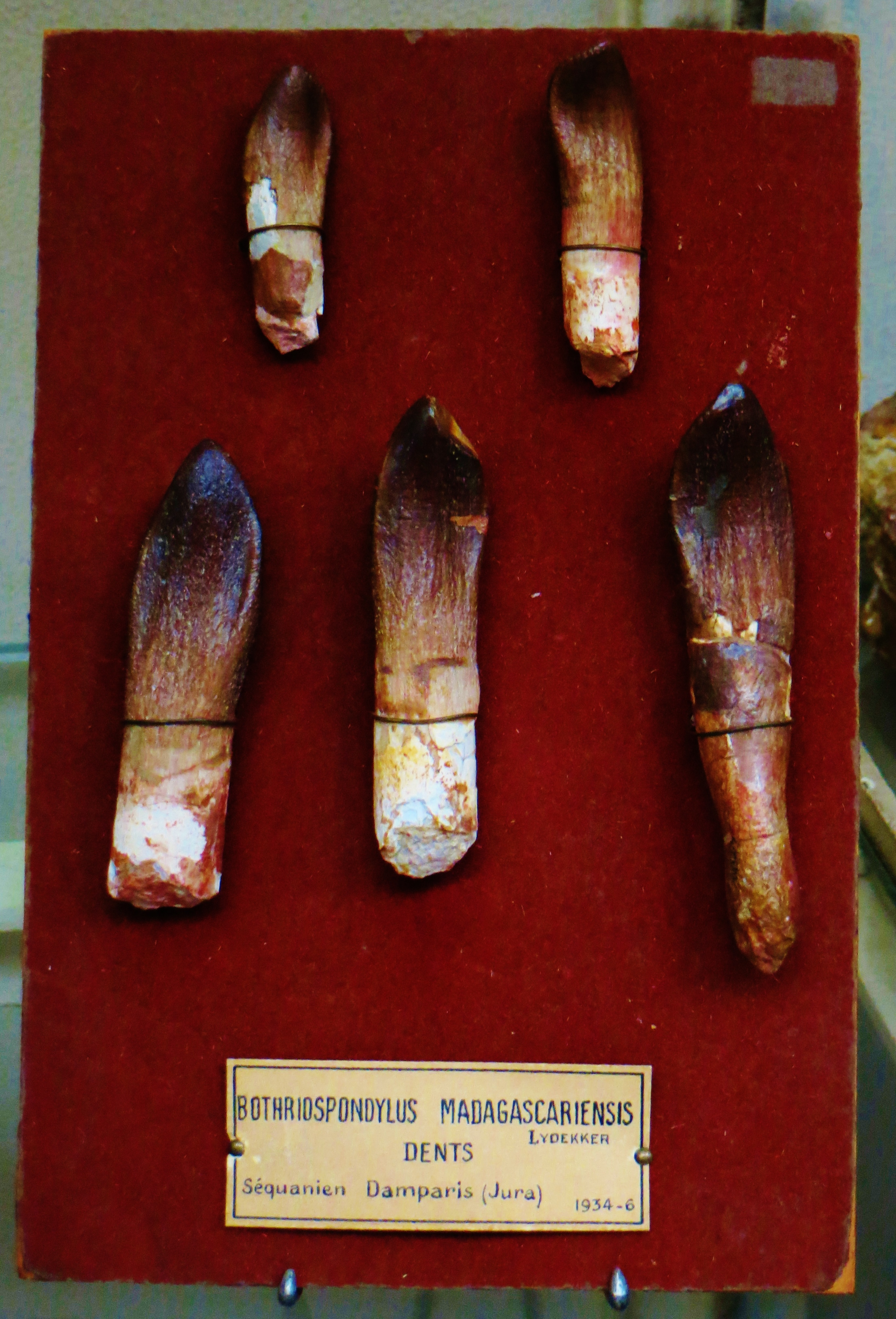 Fossil of Bothriospondylus, an extinct reptile- Took the photo at Museum Histoire Naturelle, Paris